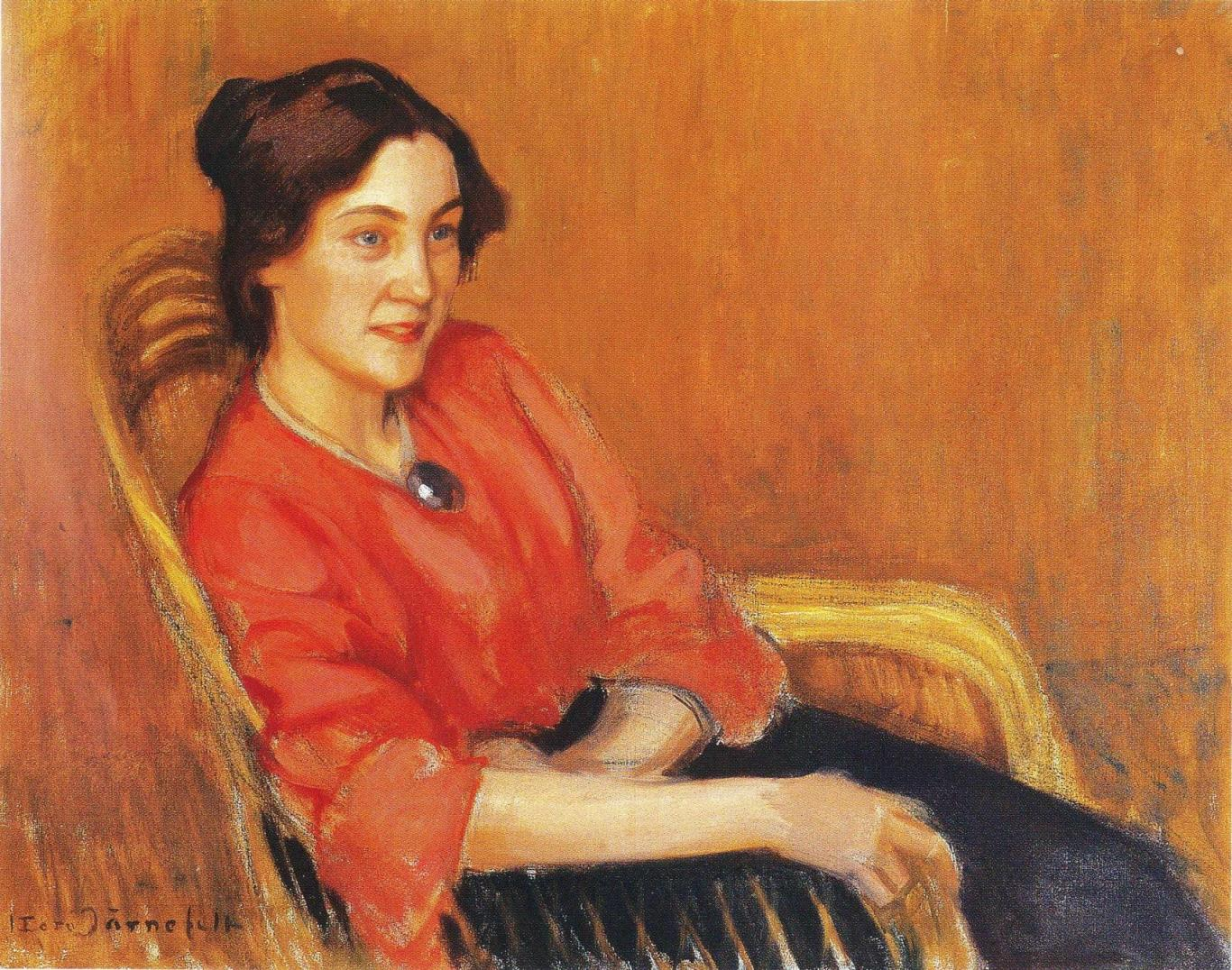 Eero Järnefeltin maalaama muotokuva vaimonsa sisaresta Nelma Sibeliuksesta (1878–1970).